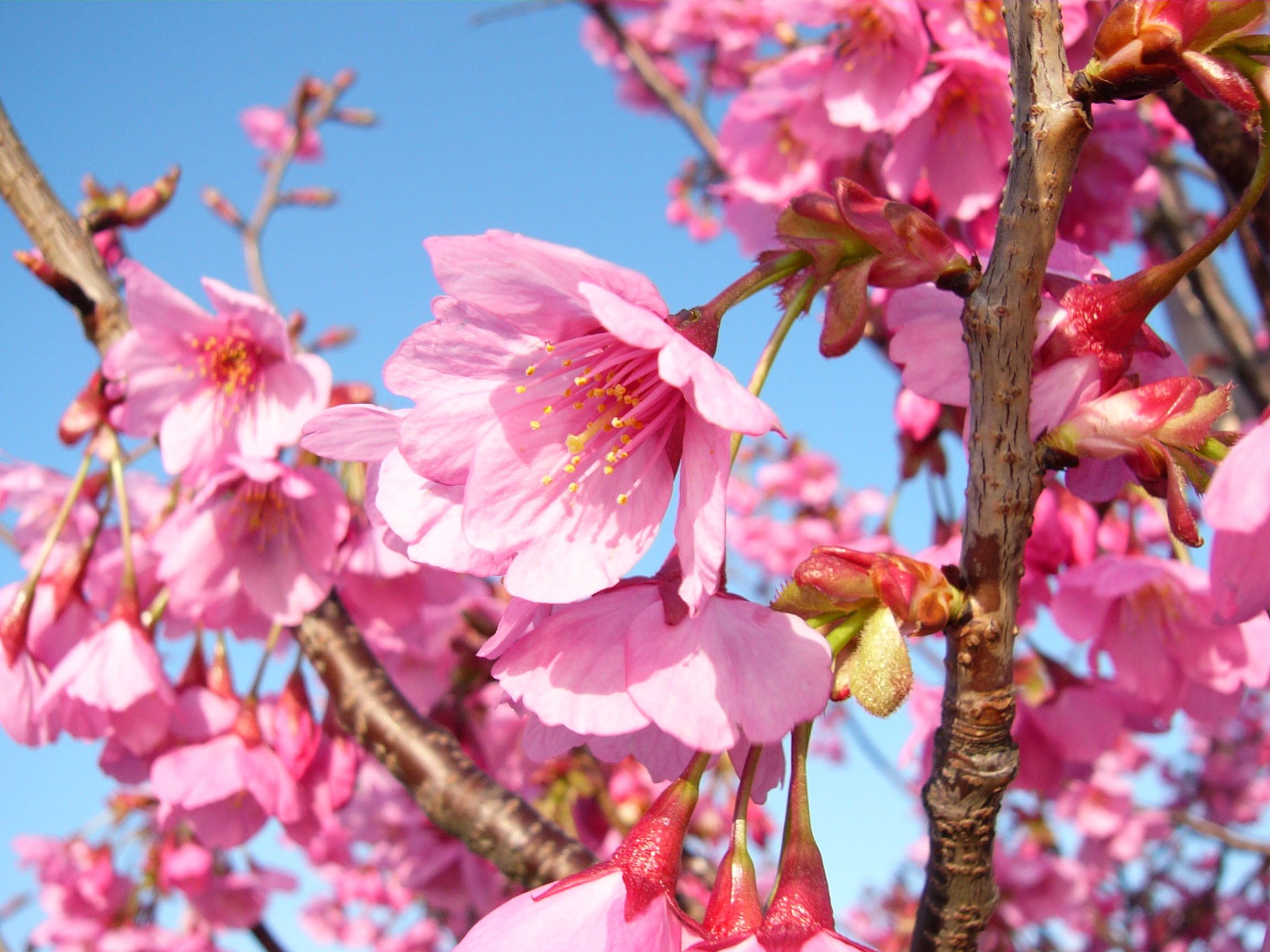 サクラの園芸品種の一種、「ヨコハマヒザクラ」(横浜緋桜)